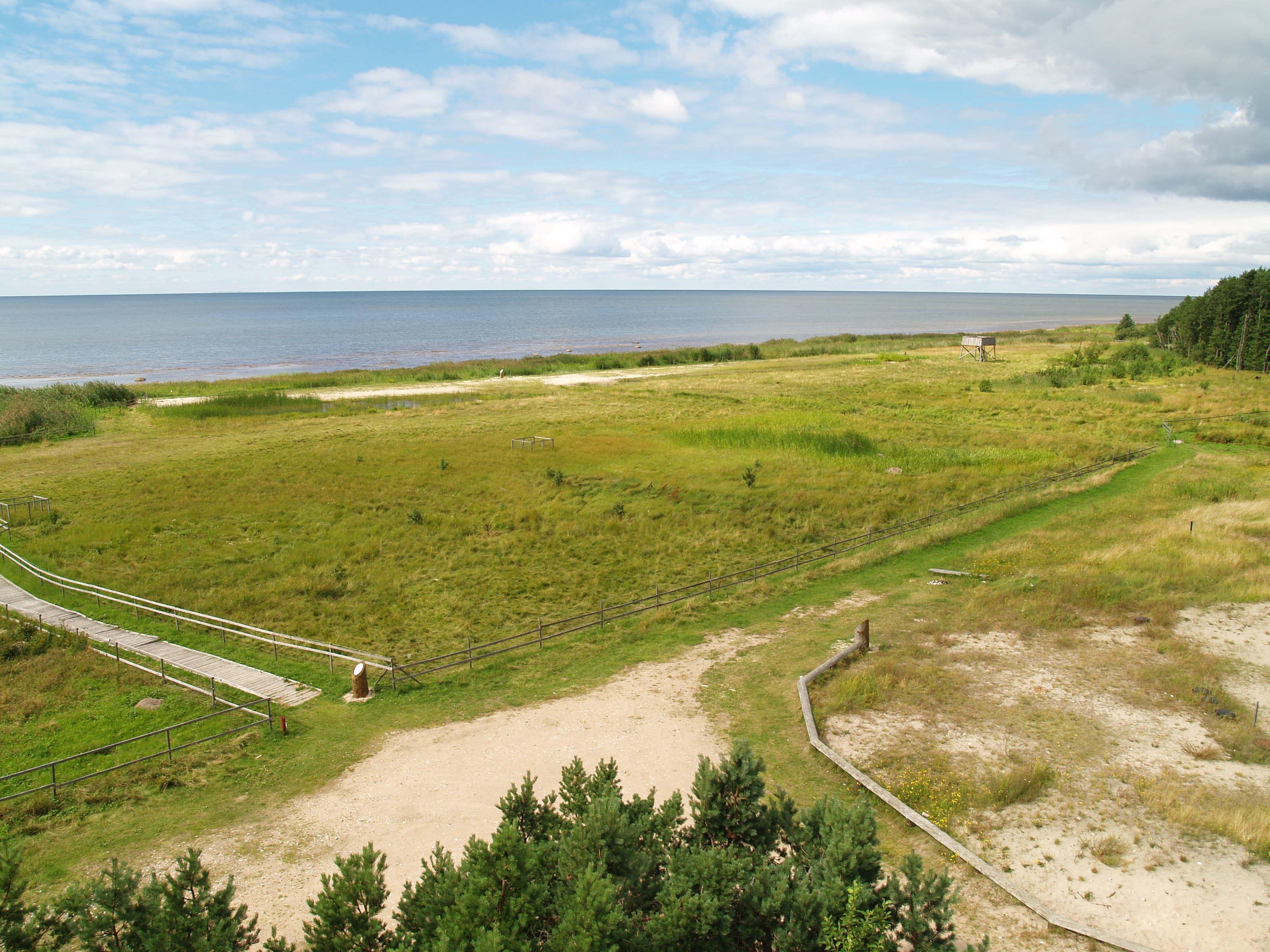 Kabli looduskaitseala linnuvaatlustornist.